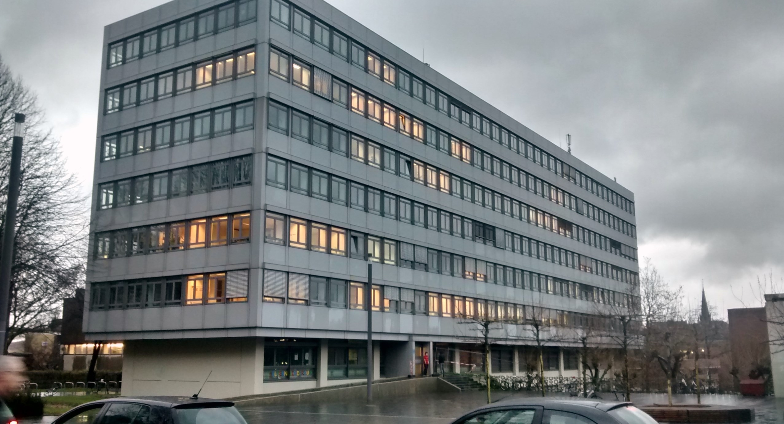 Der Aachener Grabenring im Berufsverkehr an einem Freitagnachmittag im Dezember.